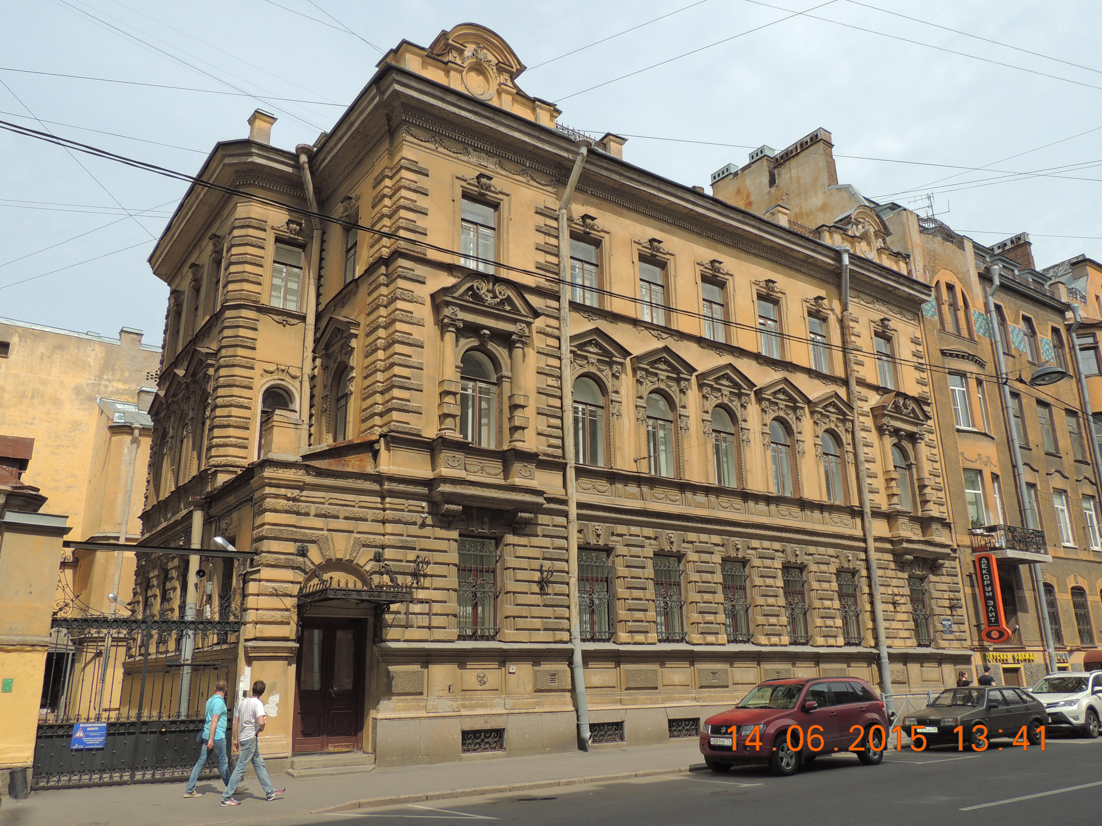 House N. Obukhov